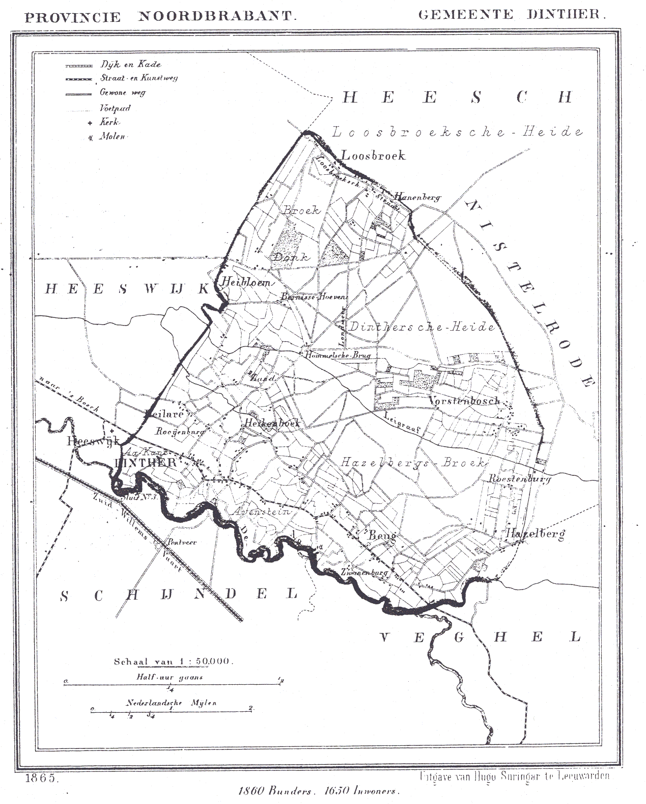 Nederland, Noord-Brabant, Gemeente Dinther